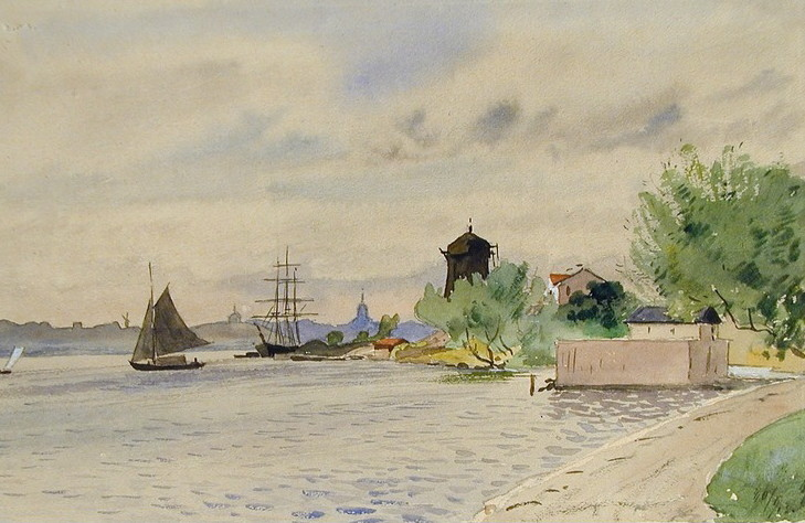 Oljekvarn Waldemarsudde, akvarell av A.T. Gellerstedt 1890